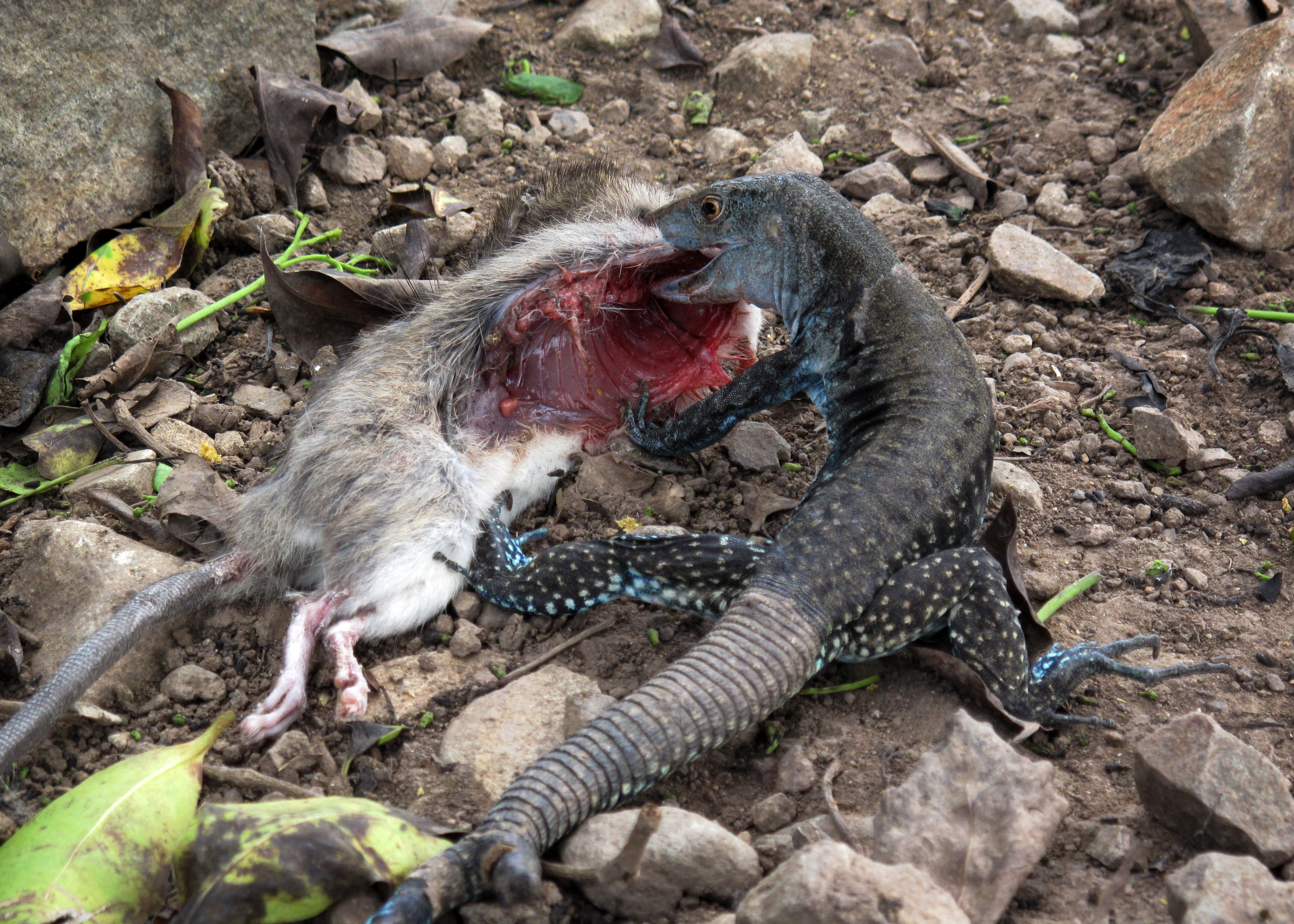 20090827 "terrible lizard"